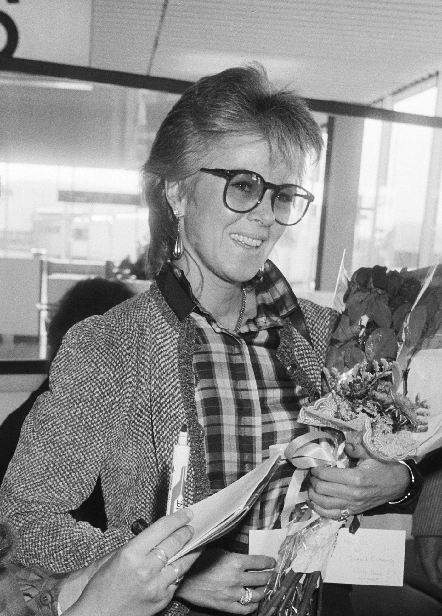 Aankomst Abba-zangeres Frida op Schiphol